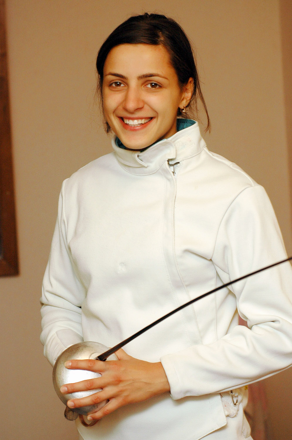 Яна Шемякіна